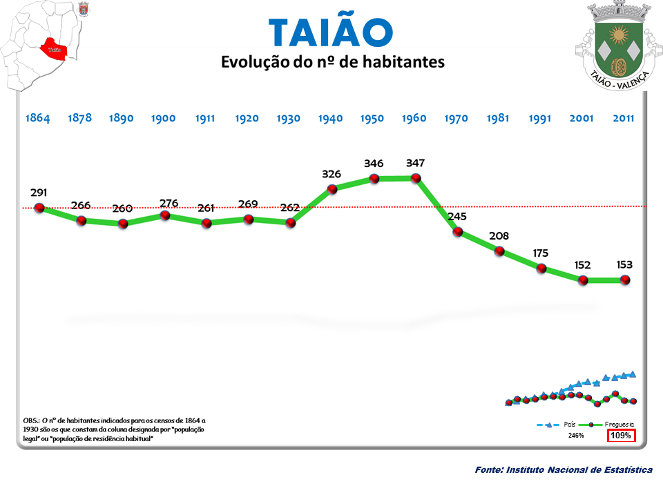 Censos 1864/2011